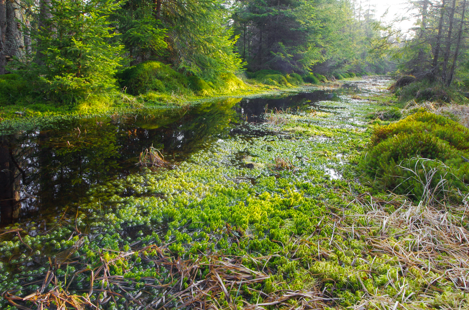 Národní přírodní rezervace Kladské rašeliny, lokalita Paterák, východní okraj lokality, okres Cheb